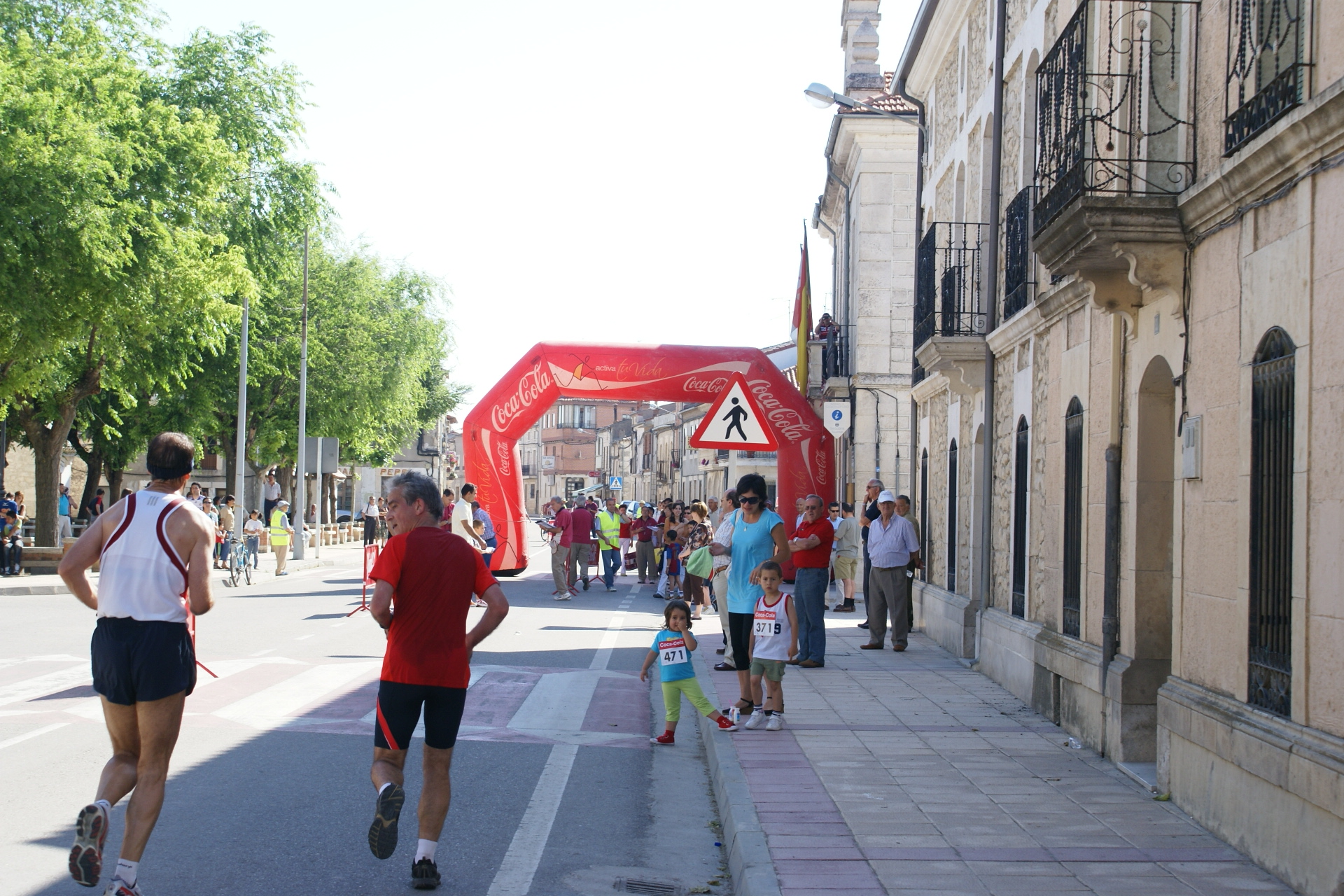 Media Maratón Santo Domingo de Campaspero, edición 2008.